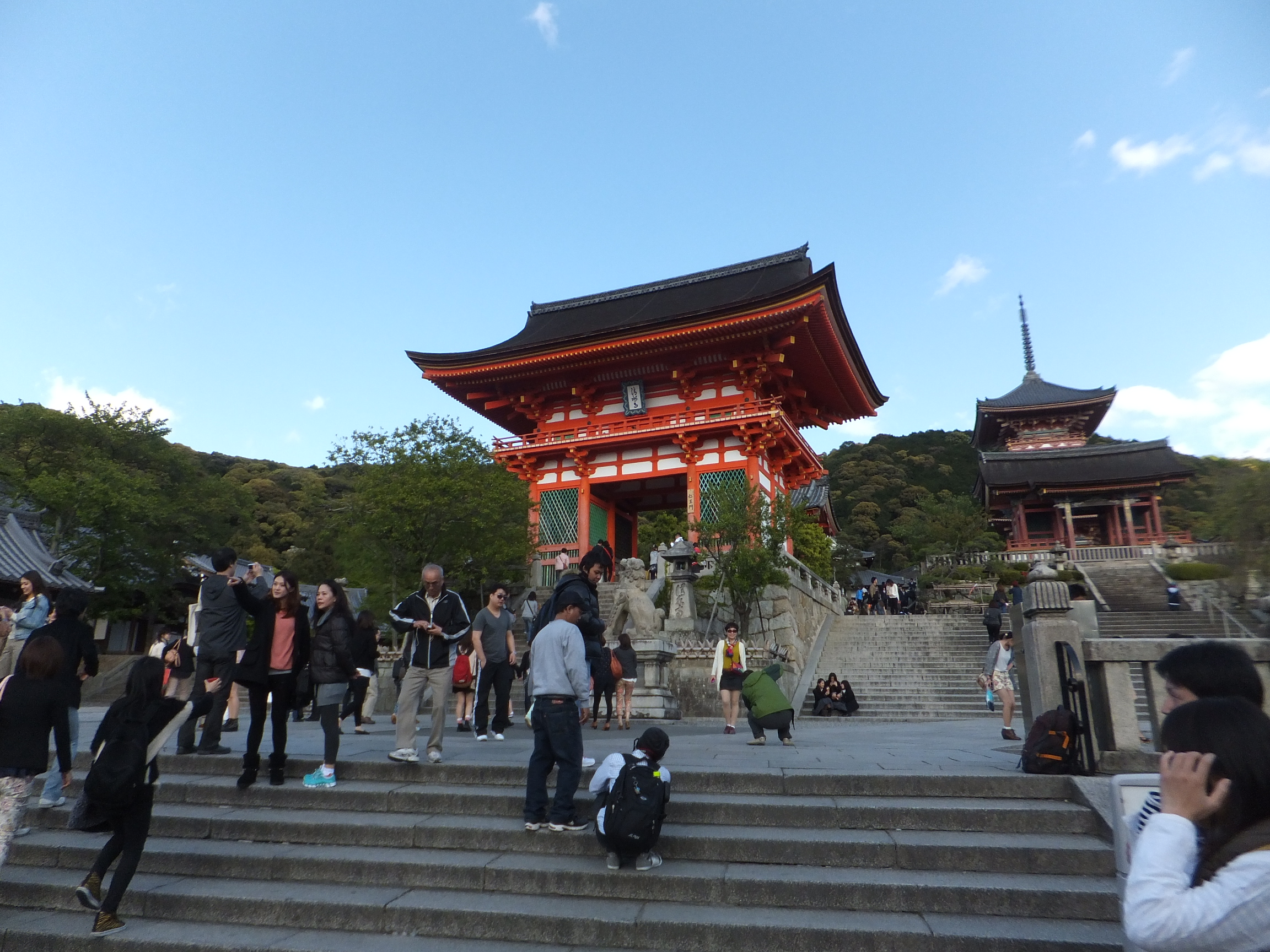 清水寺（2013年5月2日）